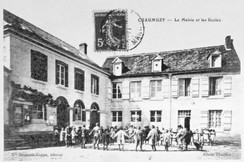 sur une carte postale du début du XXe siècle.